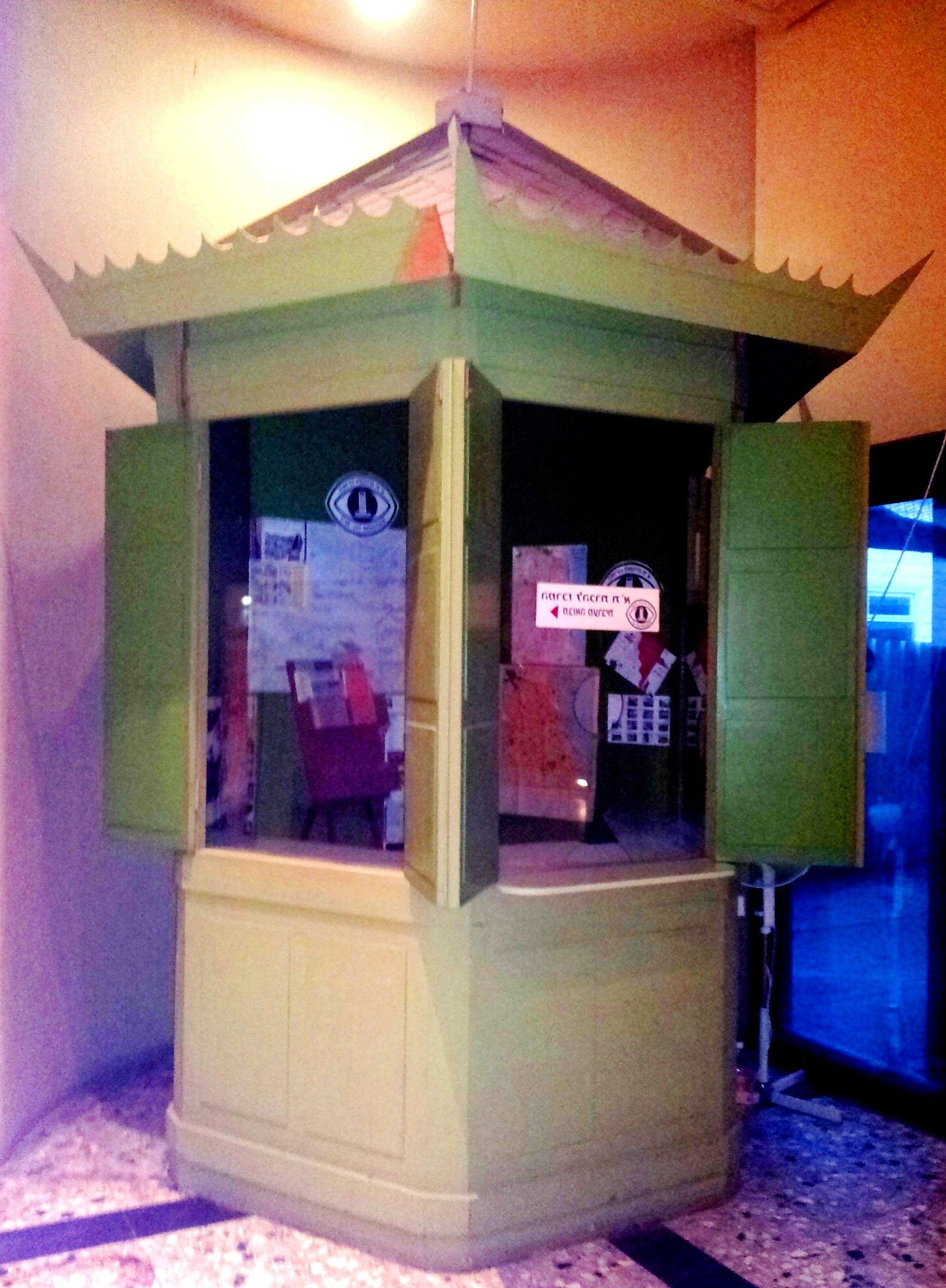 מבנה עץ של קיוסק משוחזר כפי שהיה בתל אביב בעשורים הראשונים, המוצג במבואת מגדל שלום בתל אביב